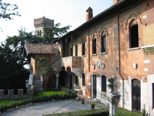 Casa del Podestà, Fondazione Ugo da Como, Lonato, Brescia. Museo